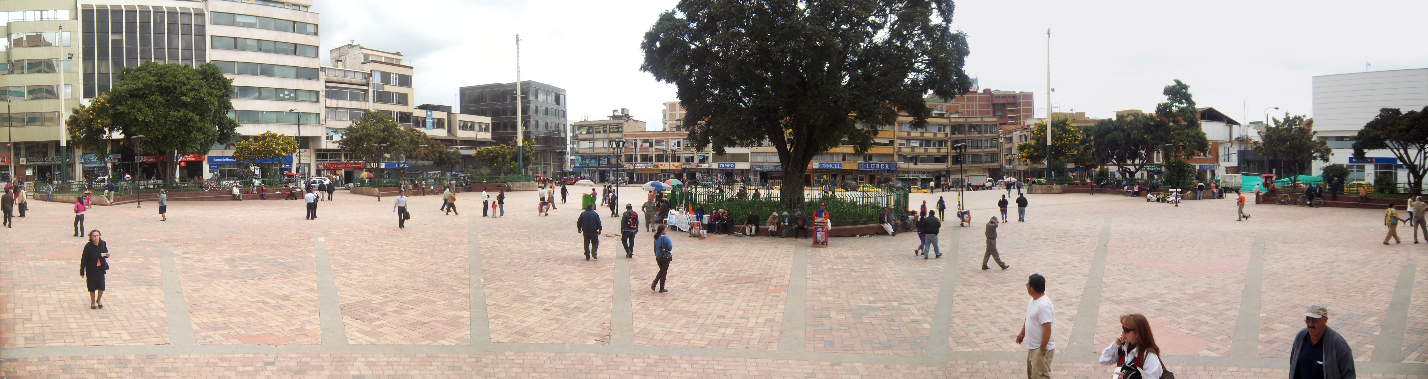 Panoramica Centro De Duitama